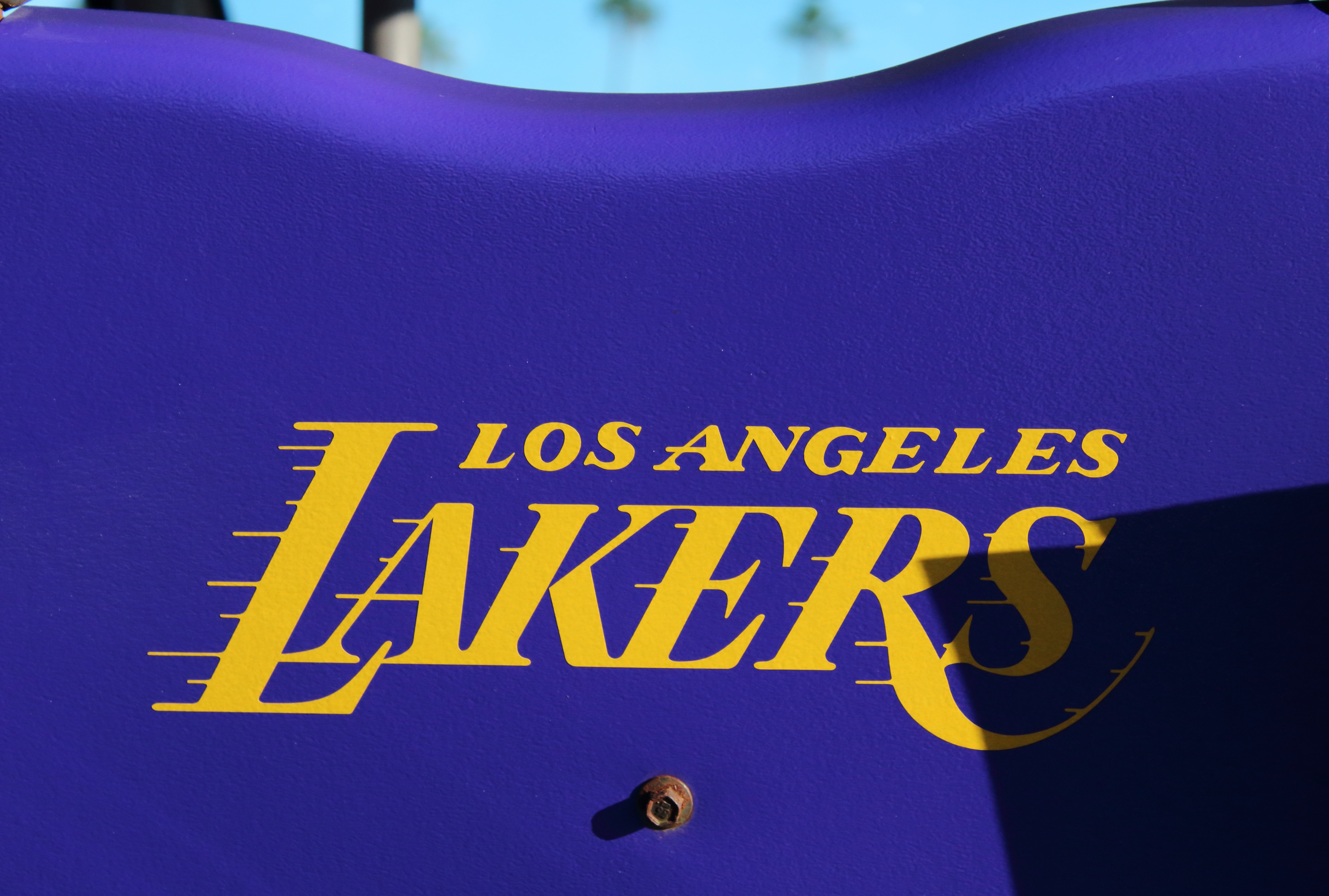 Logo de "Los Angeles Lakers".